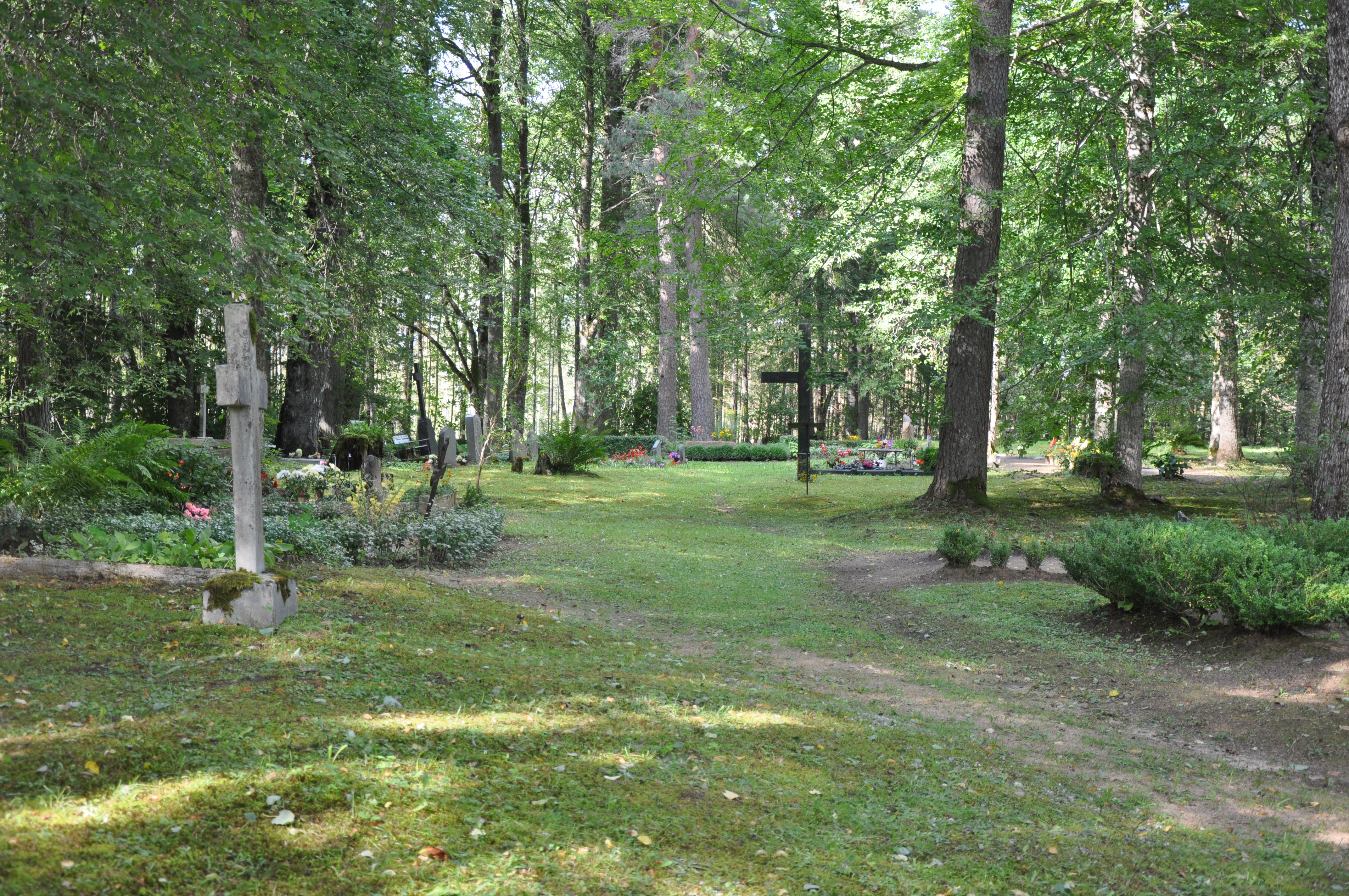 Alakstes kapi, Dundagas pagasts, Dundagas novads, Latvia